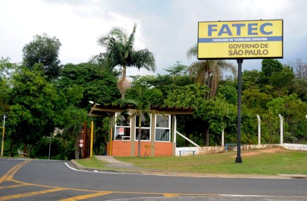 Entrada da Fatec Sorocaba